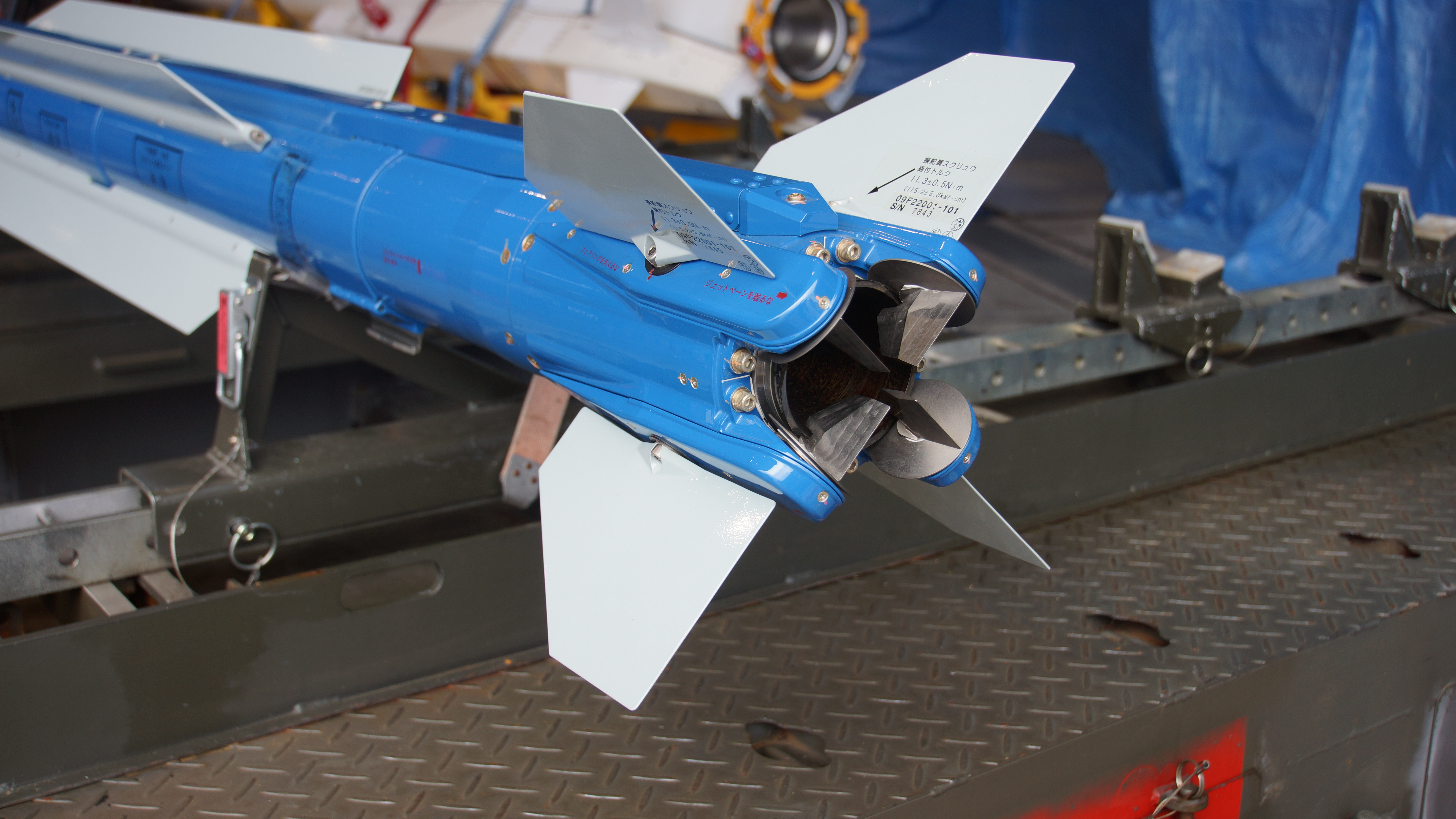 航空自衛隊 04式空対空誘導弾（改）（AAM-5（改）） 操舵翼及び推力偏向部（TVC） 左後部。2017年11月19日 岐阜基地にて。